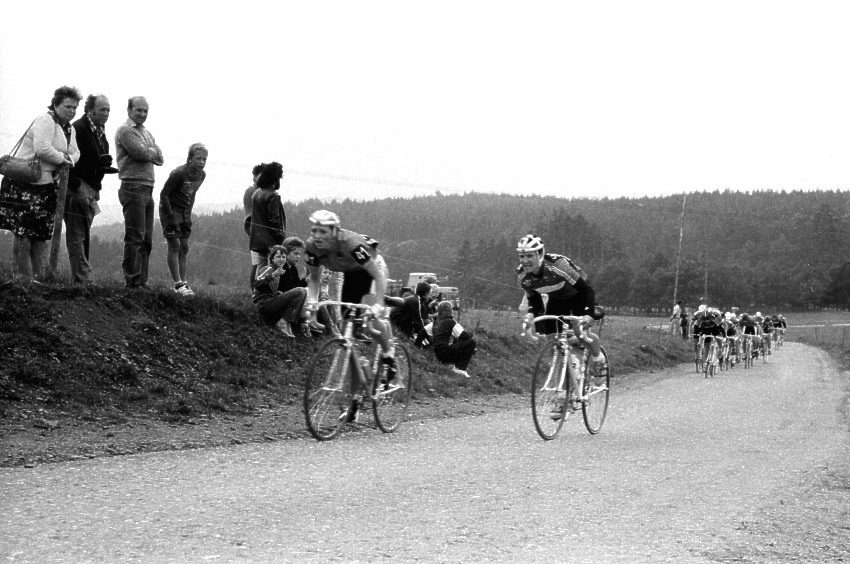 Internationale Thüringen-Rundfahrt der Frauen, Straße von Talsperre Zeulenroda nach Langenwolschendorf